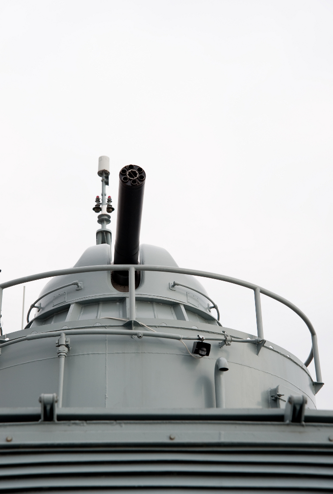 Dan HRM-a, Rijeka